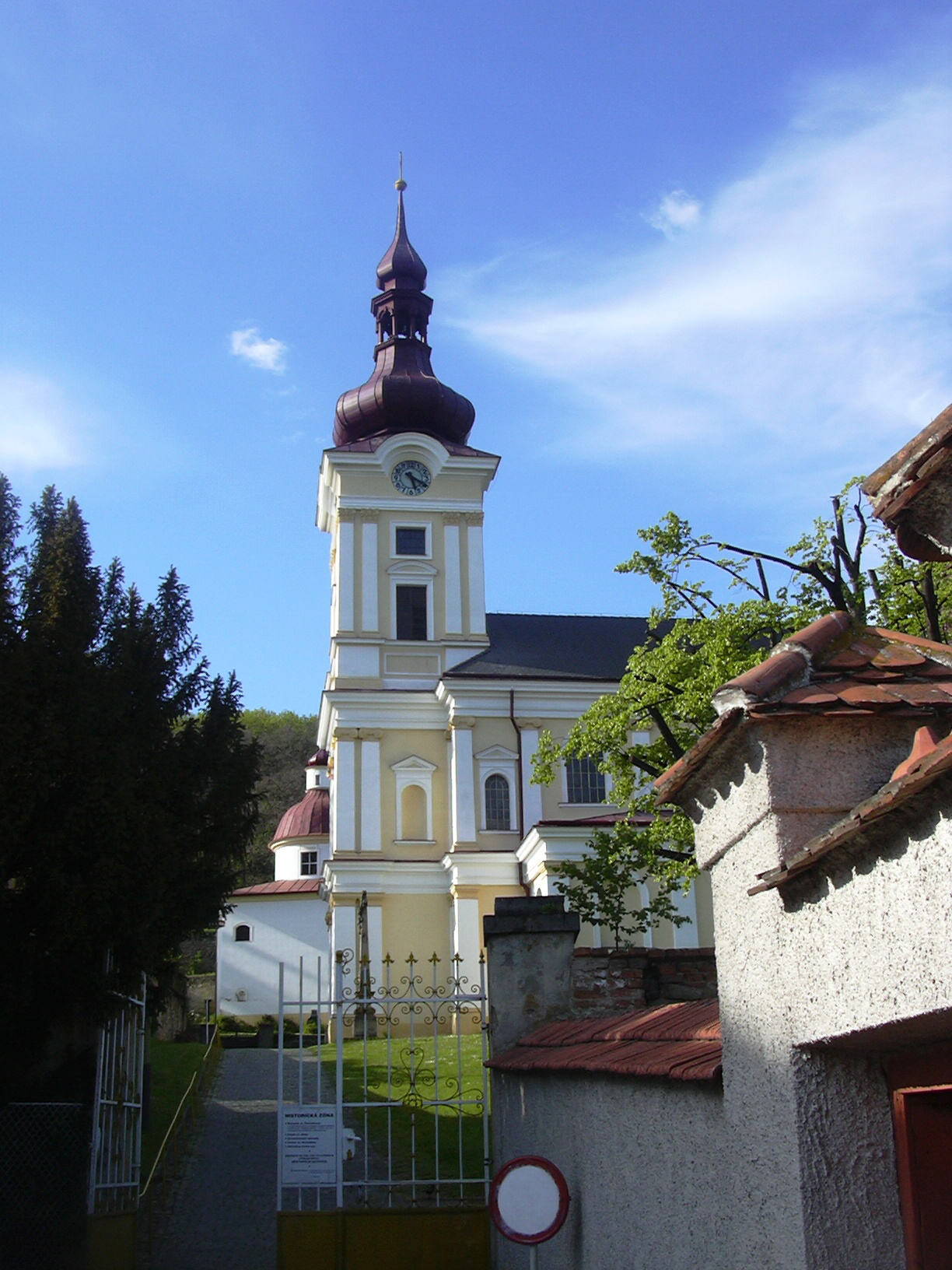 Pustiměř - kostel svatého Benedikta (Vyškov District, Czech Republic)